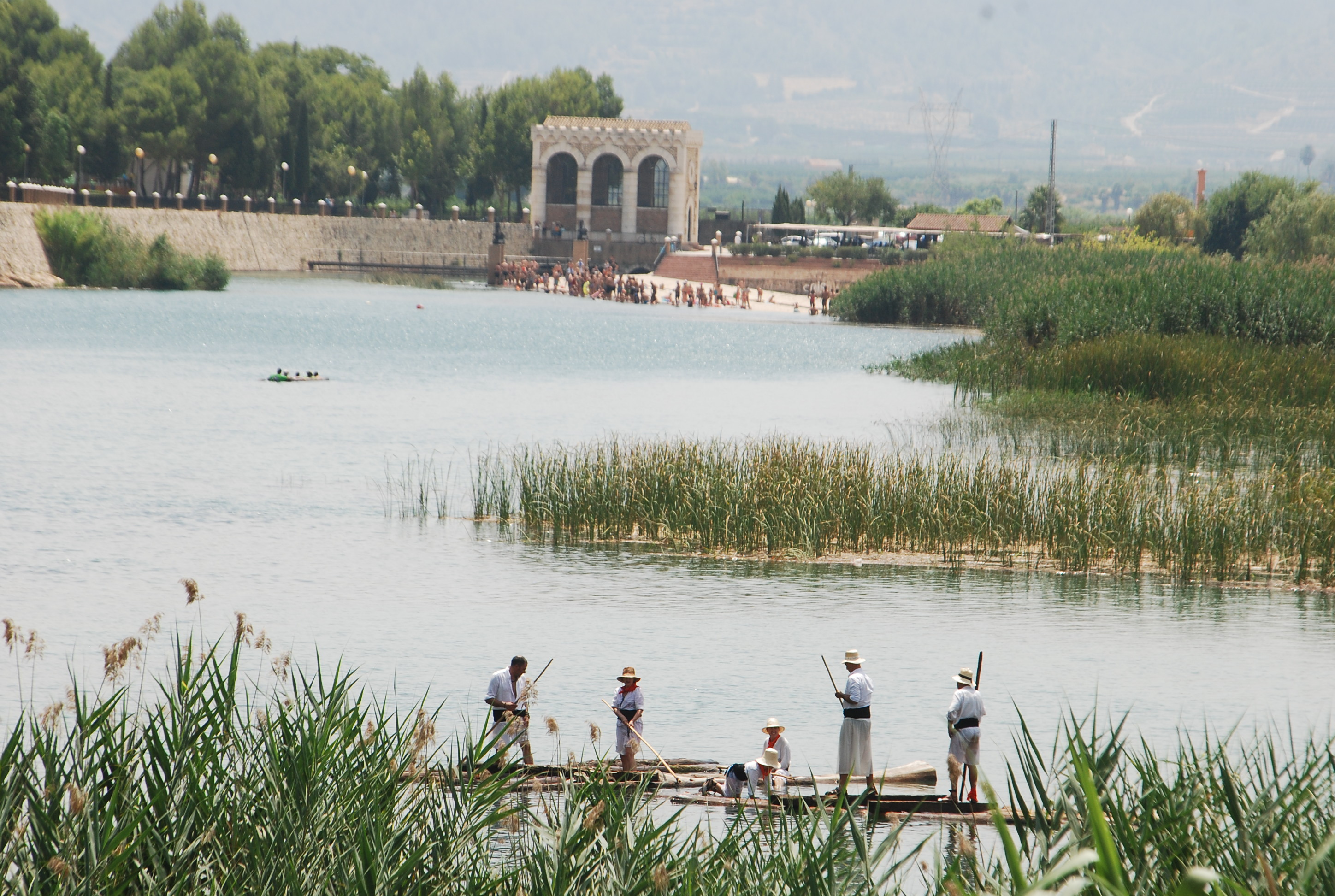 Un momento de la sexta edición de la fiesta de Maerà en la que los gancheros locales conducen los troncos por aguas del Xúquer hasta l'Assut d'Antella.